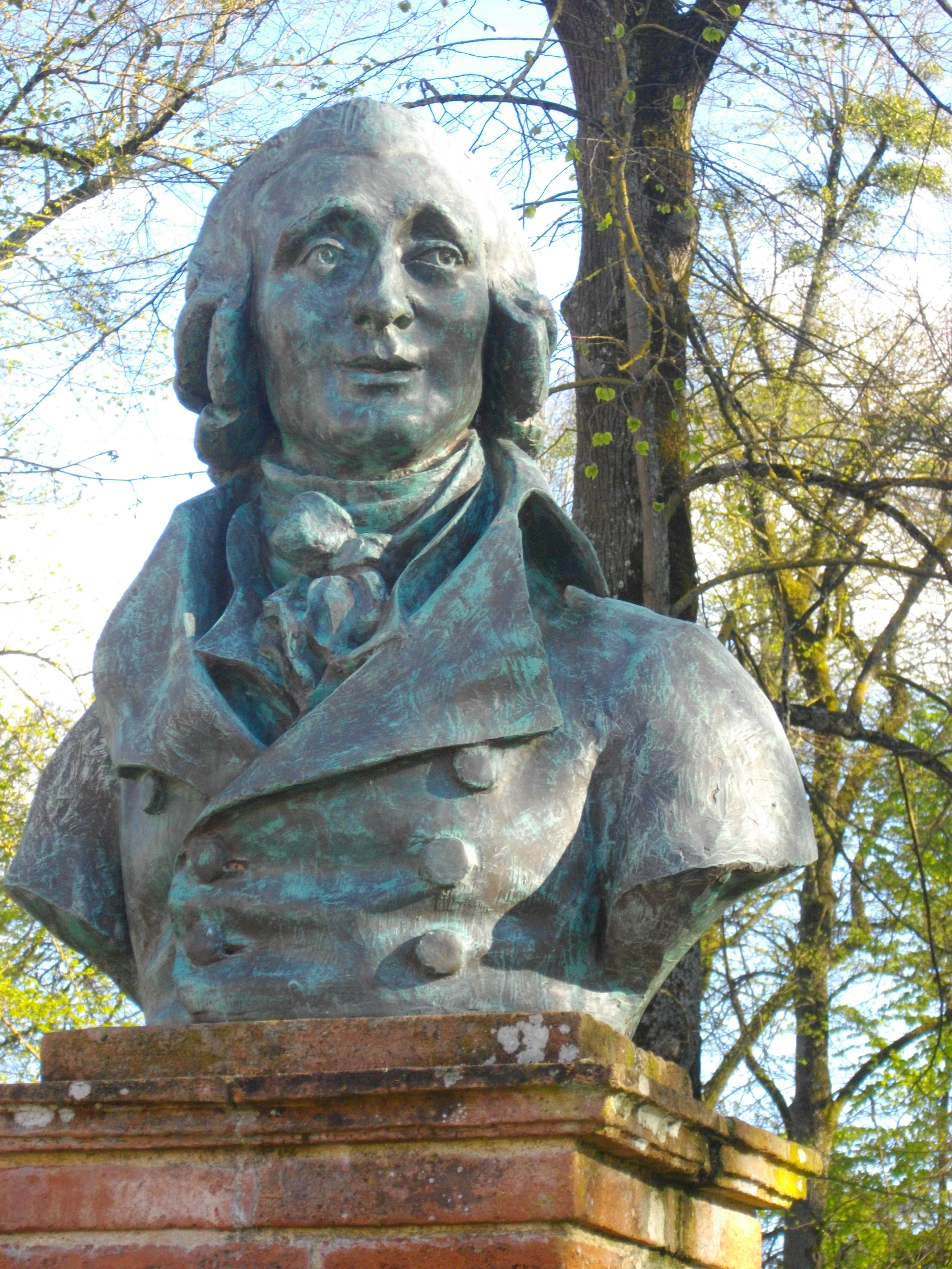 Buste d'Antoine Portal, médecin né à Gaillac, pris en avril 2016 vers 18h.